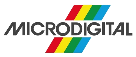 A Microdigital Eletrônica Ltda. foi uma empresa brasileira de microinformática na década de 1980, com sede em São Paulo. Essa ERA sua logmarca.